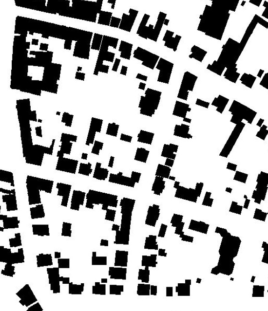 Skizze Schwarzplan